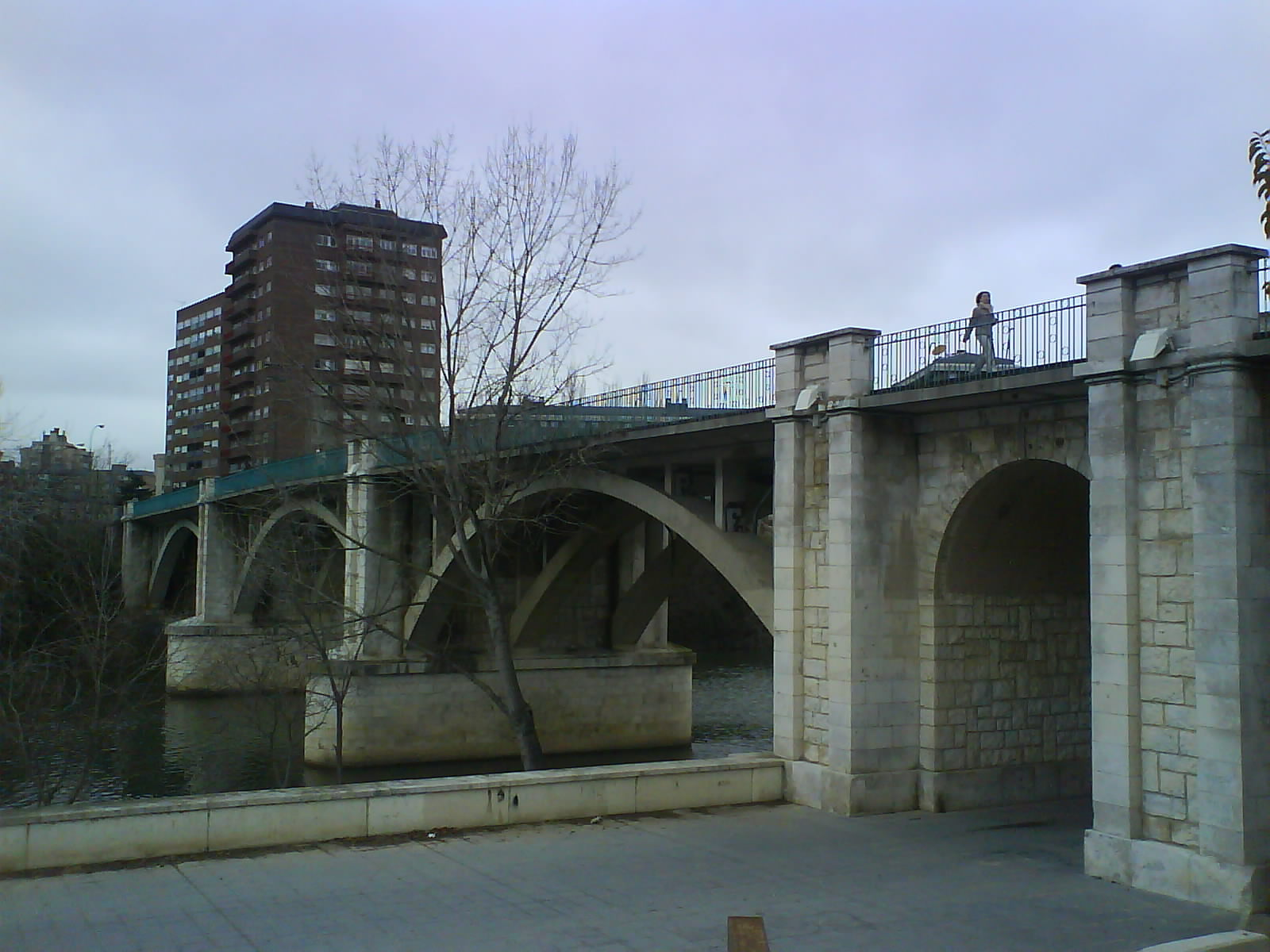 Vista del Puente del Poniente (o de Francisco González Regueral) sobre el río Pisuerga en Valladolid, desde la orilla izquierda del río, bajo la rosaleda de Francisco Sabadell.